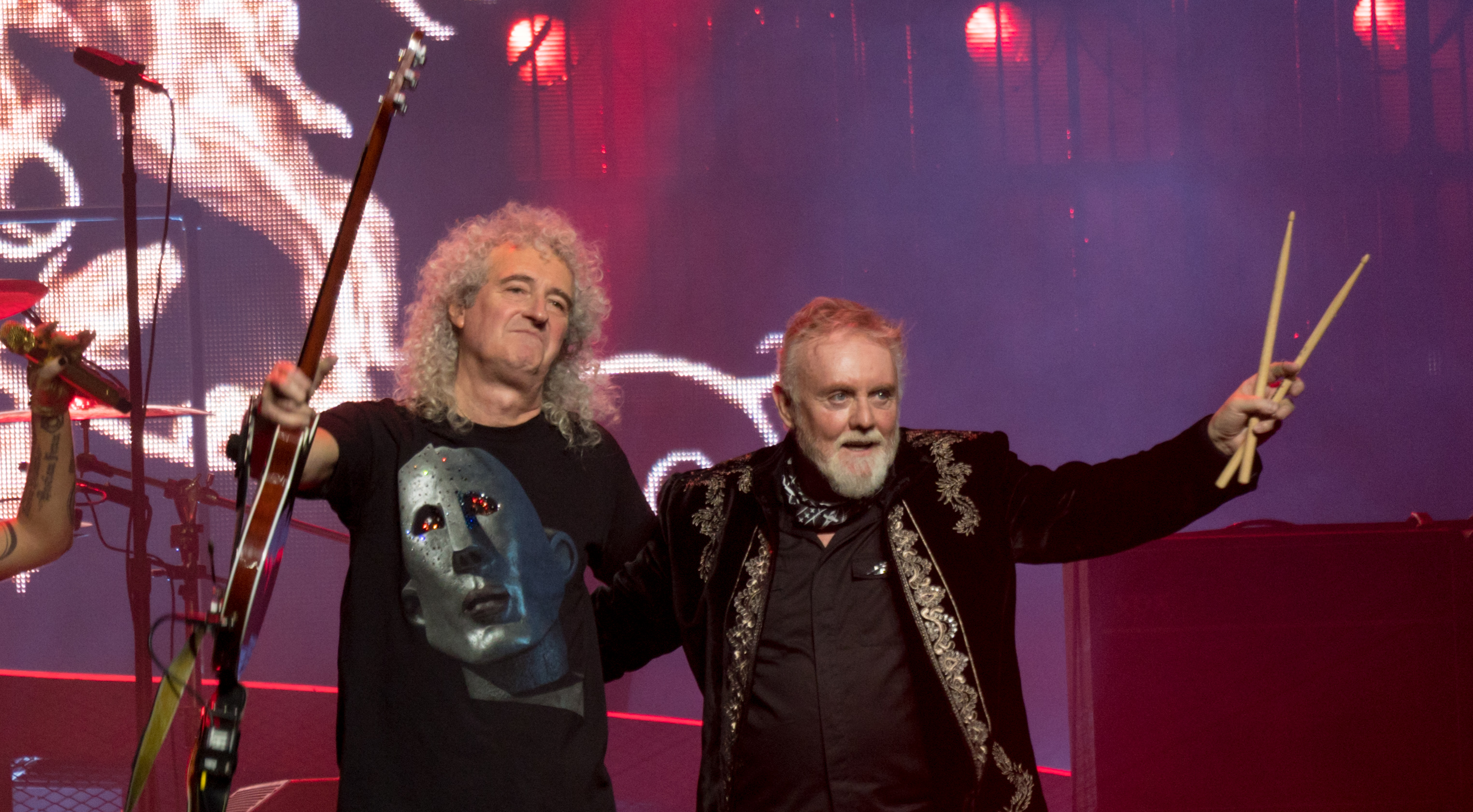 QueenO2121217-80